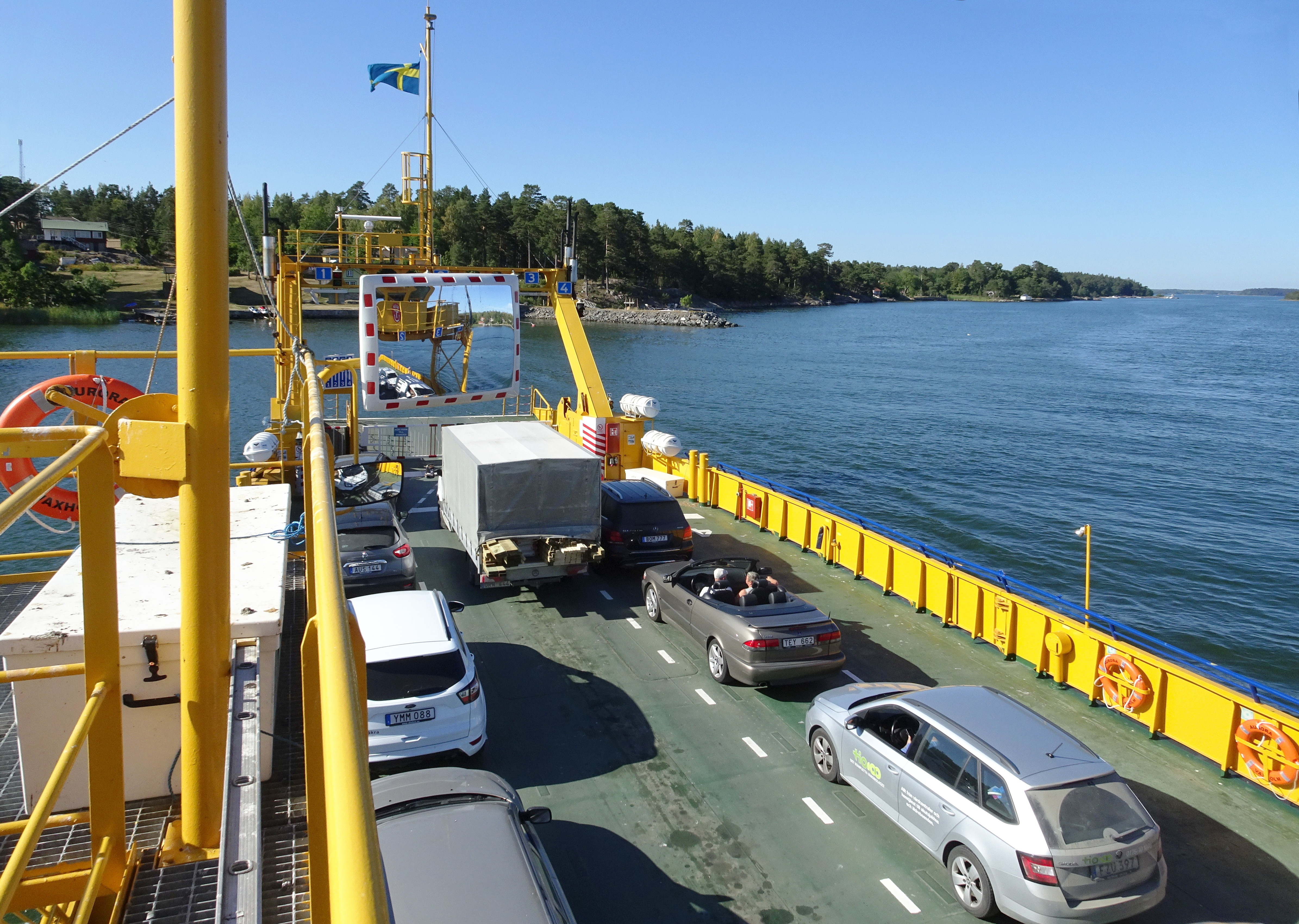 M/S Aurora på Blidöleden mot Yxlan